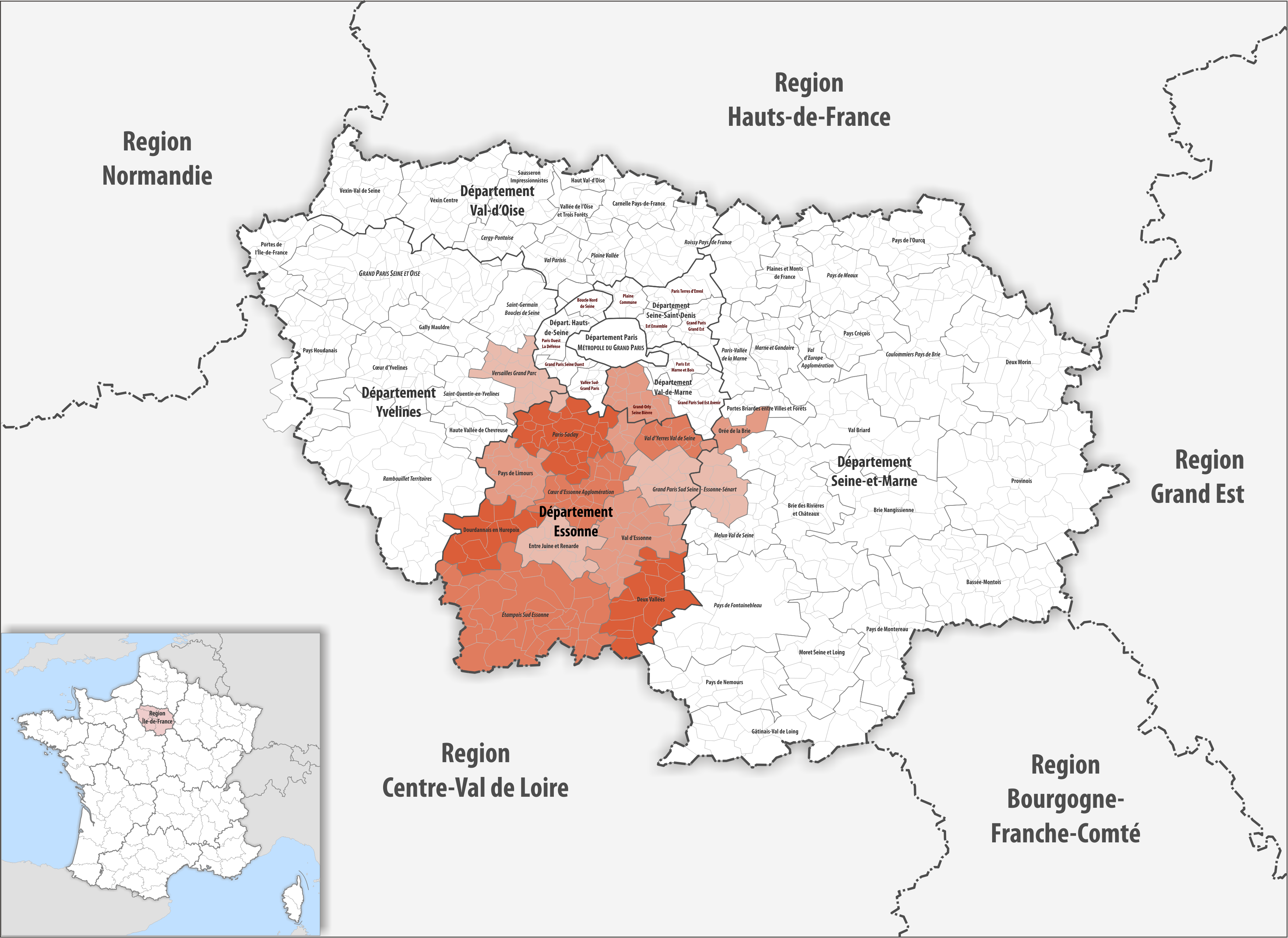 Gemeindeverbände im Département Essonne